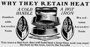 Advert for Asbestos iron, 1890s